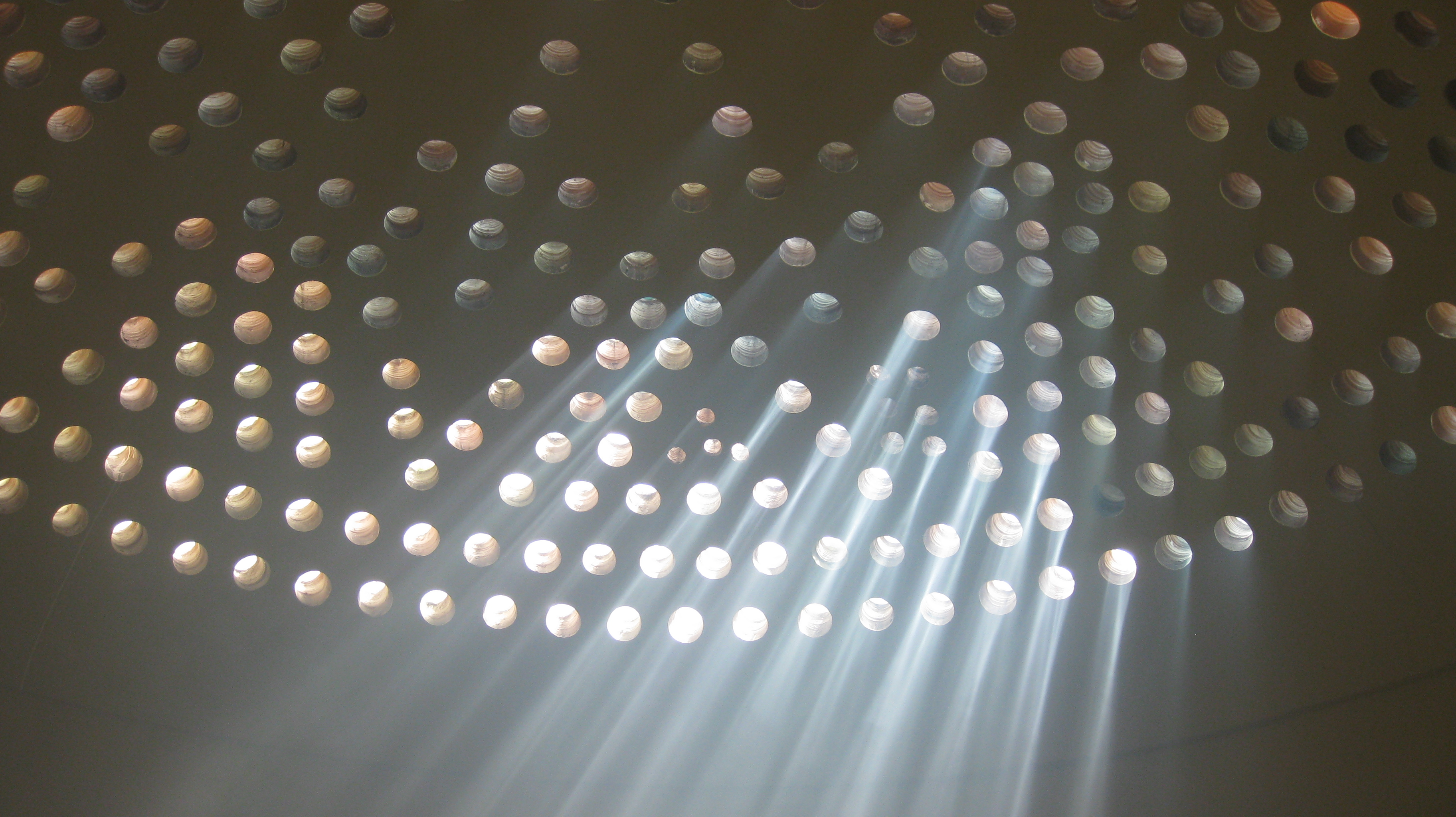 Acco (Acre, Akko) - Hamam el Basha (Hamam el Pasha) עכו חמאם אל באשה (חמאם אל פאשה) - בית המרחץ התורכי